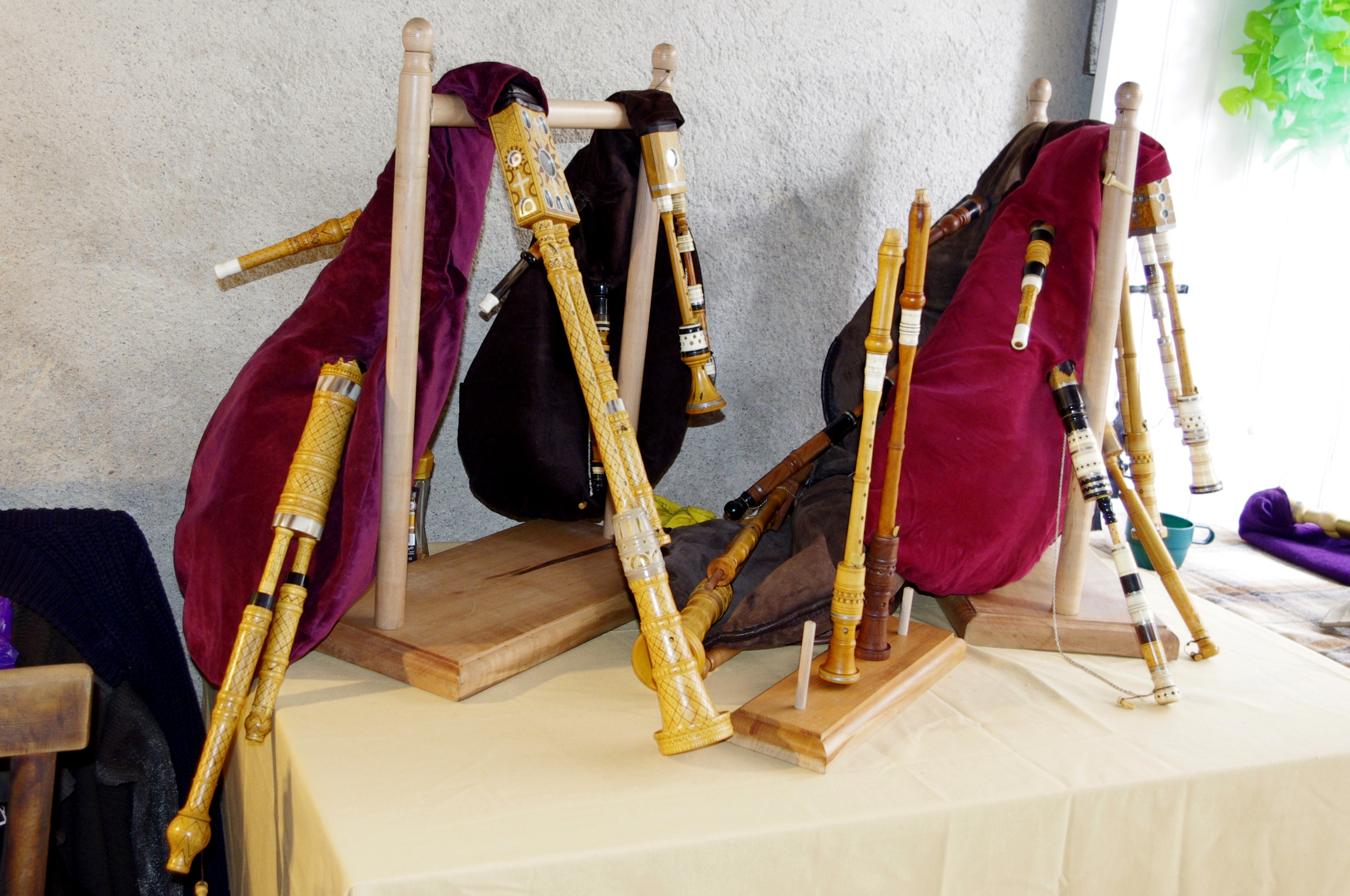 Félibrée à Piégut-Pluviers 2012 - Cornemuses